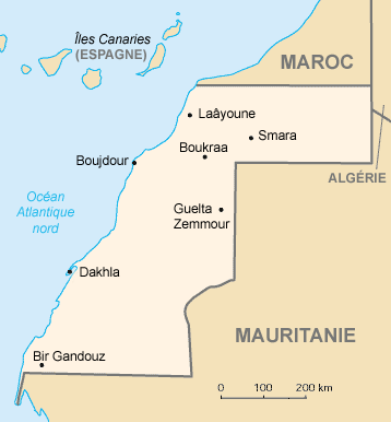 Sahara Occidental d'après la carte du World Factbook de la CIA